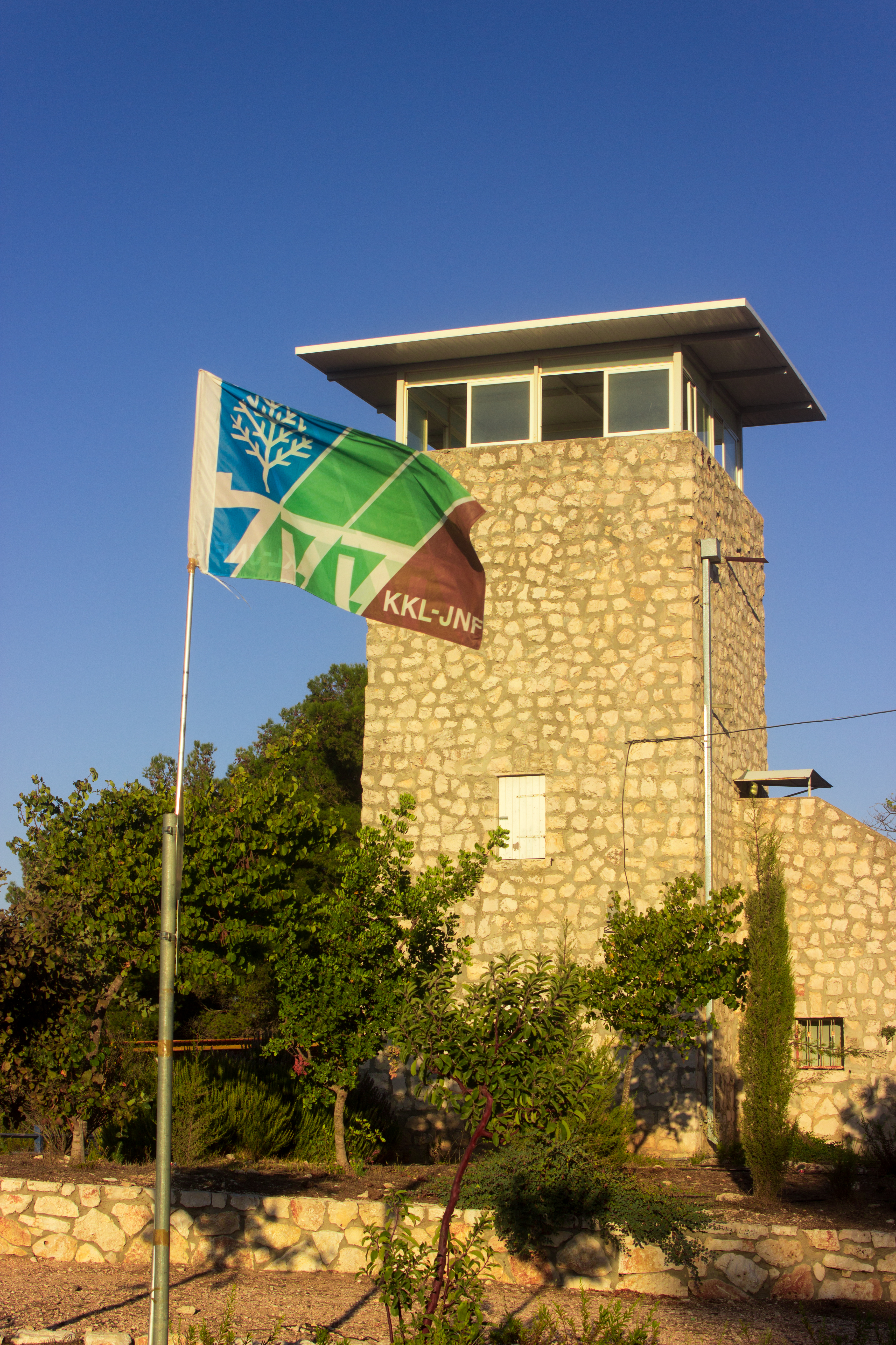 מצודת ביריה היא מצודה שנבנתה בשנות המנדט הבריטי בסמוך למקום בו מצוי כיום מושב ביריה, שהייתה זירת האירוע המכונה "העלייה לביריה" בשנת 1946, ומשמשת כיום כמוזיאון.